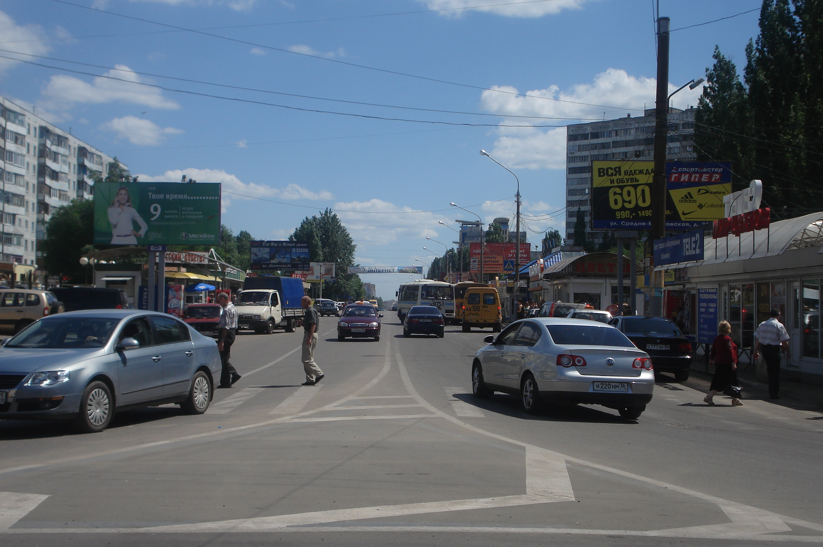 Улица Генерала Лизюкова в Воронеже